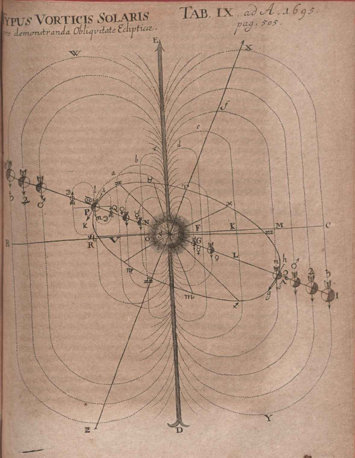 Illustration